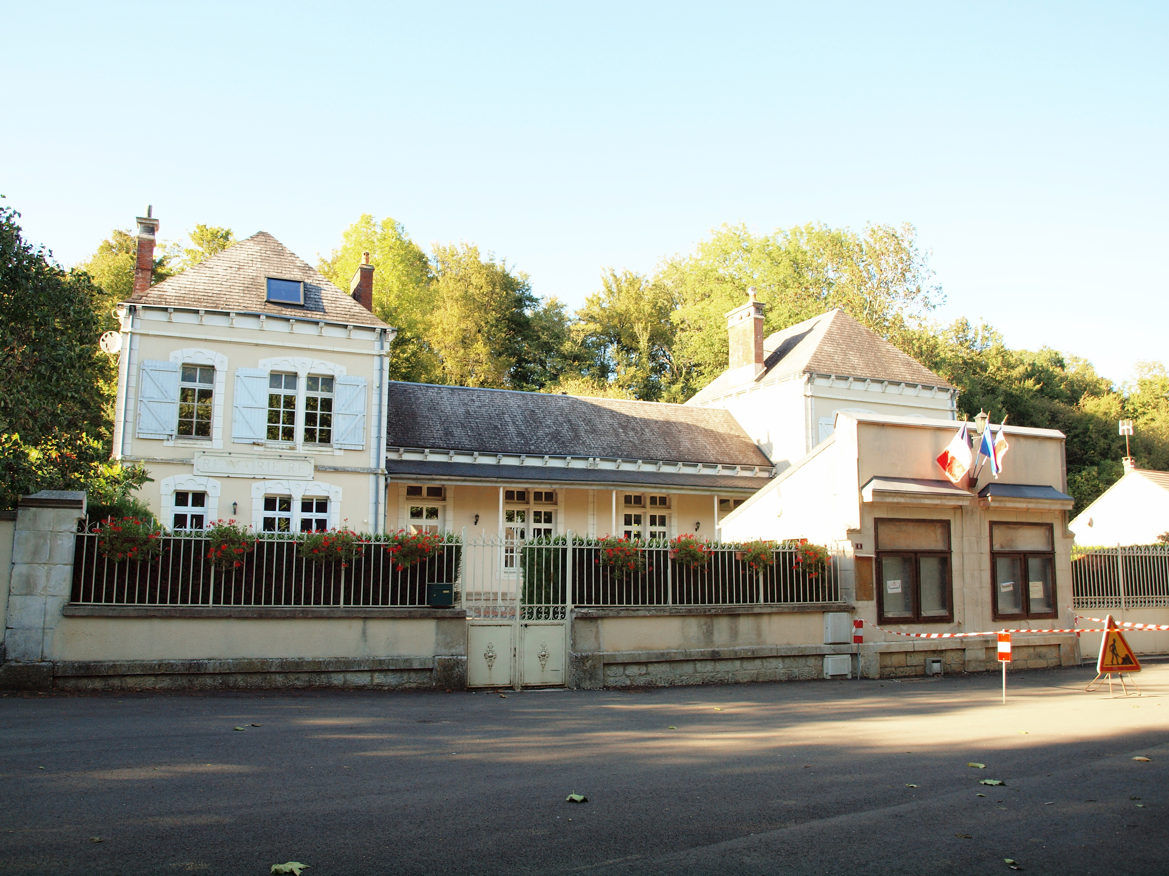 Merry-Sec (Yonne, France)